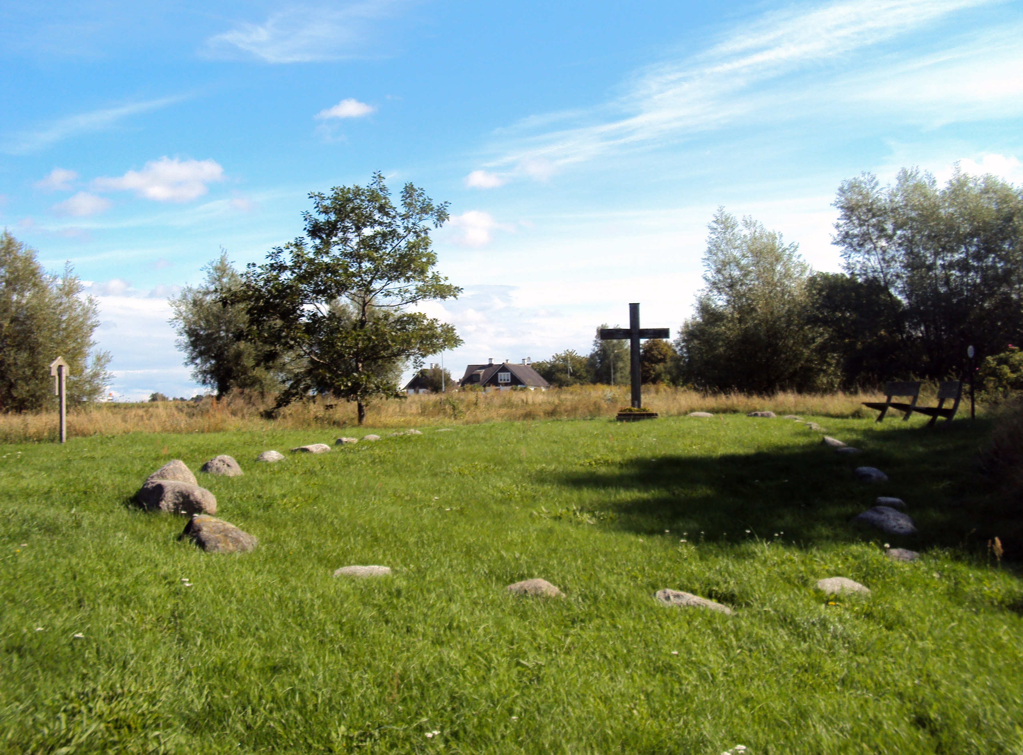 Kämpinge kyrkplats, stenarna markerar kyrkans placering